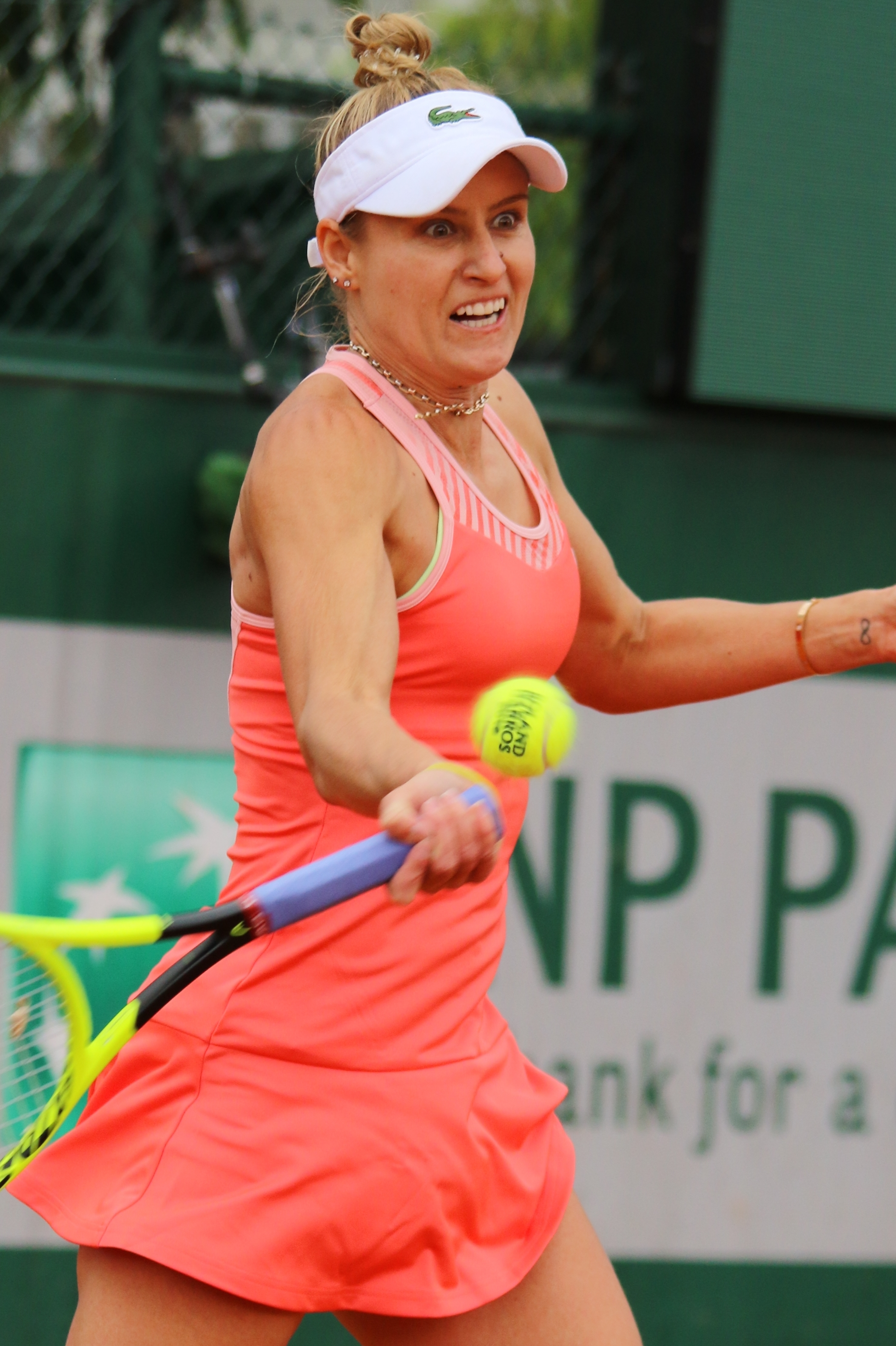 Adamczak RG19 (6)